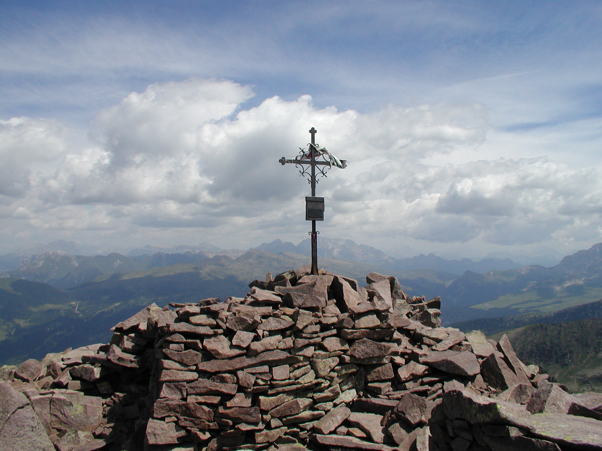 Cima Cece (2.754m), gruppo dei Lagorai, Dolomiti